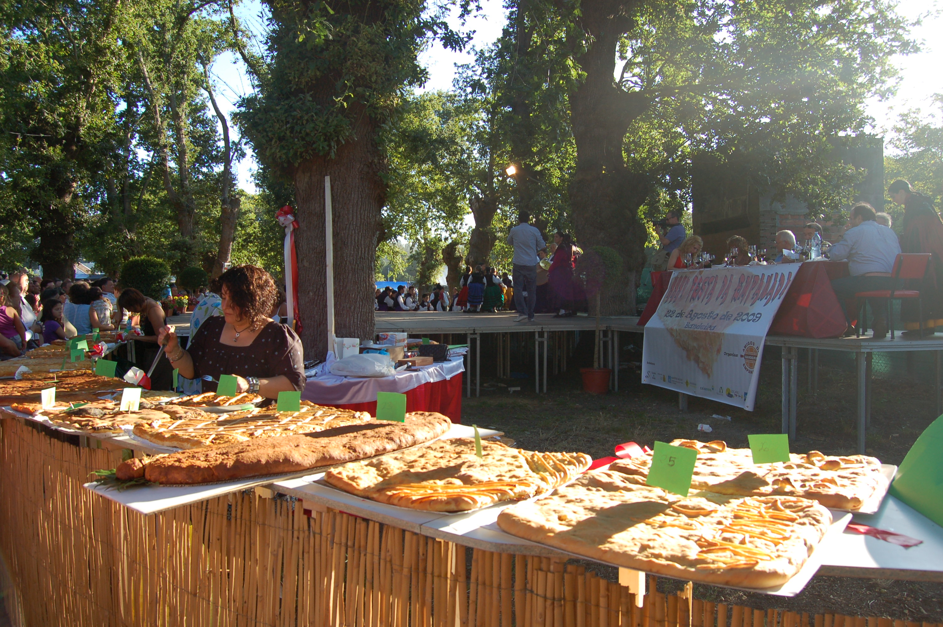 Festa da empanada da Bandeira, celebrada na Bandeira (Manduas, Silleda).